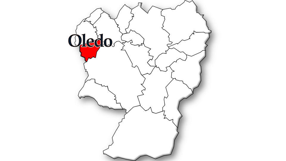 População